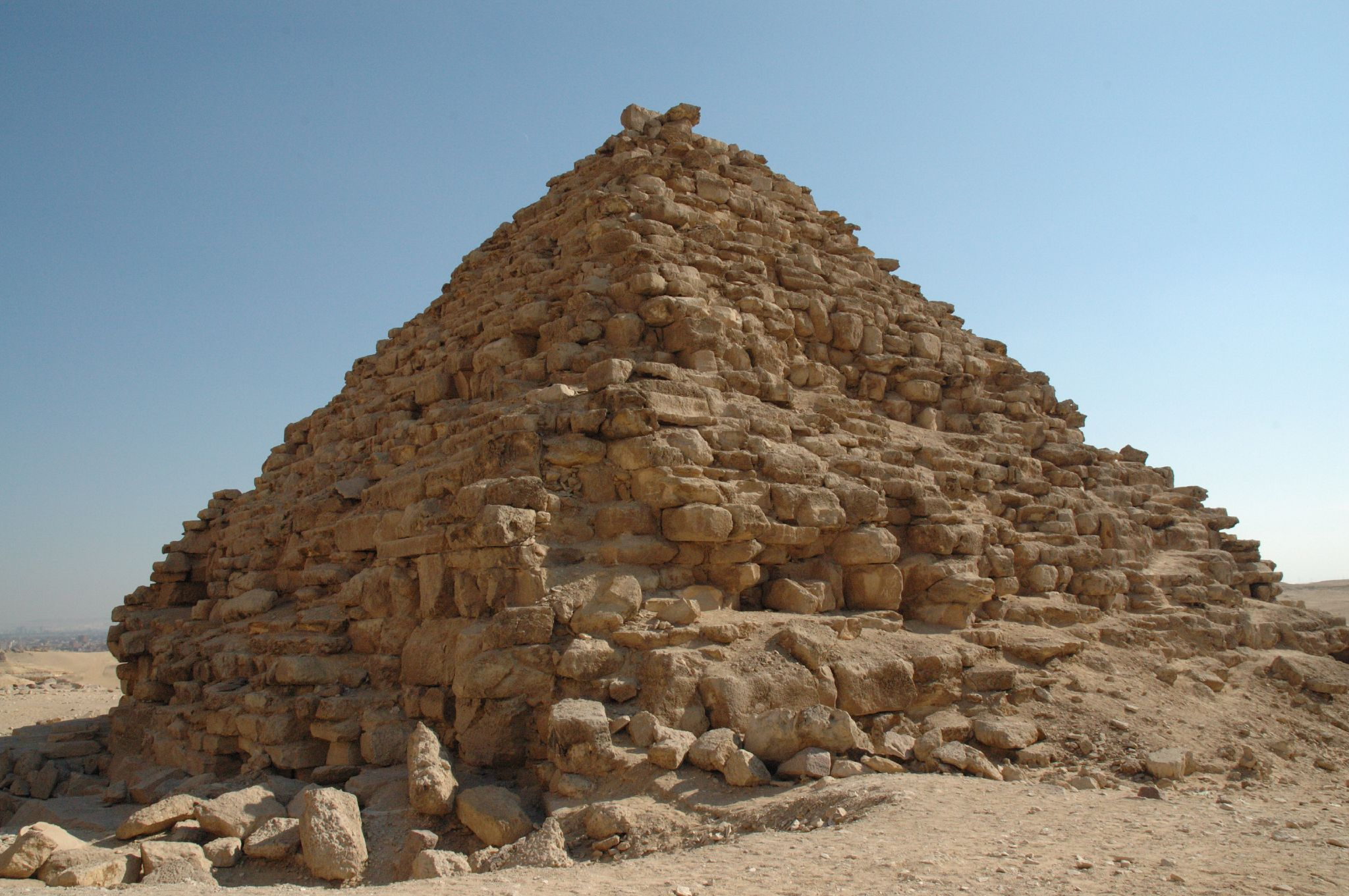 Giza: piramide di Kamerernebti